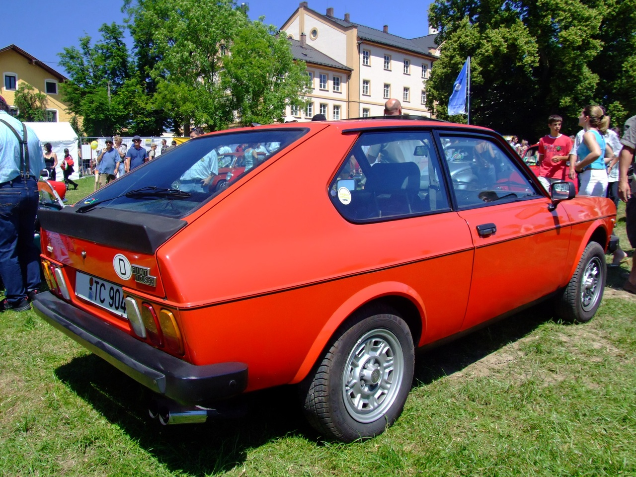 Quelle: selbst fotografiert, 06/2007 Fotograf: Späth Chr.